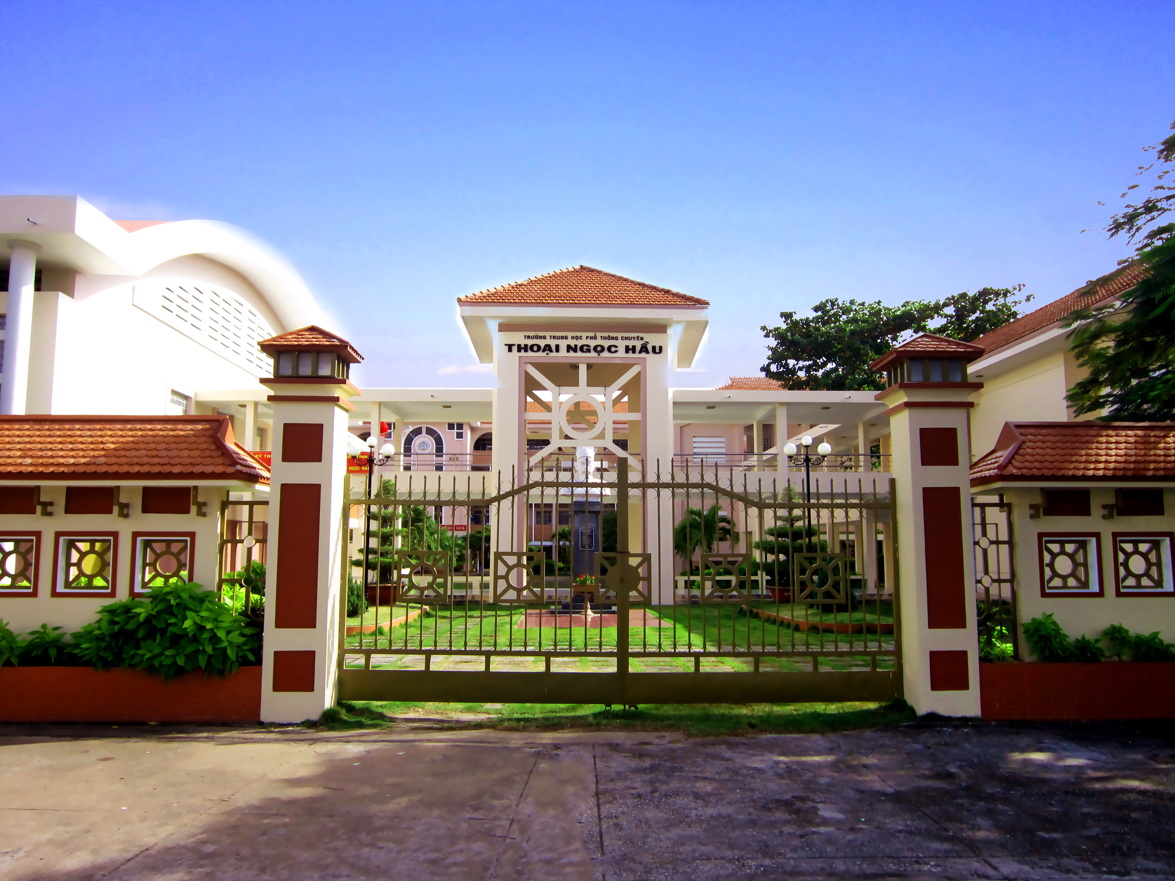 Trường THPT chuyên Thoại Ngọc Hầu ở nội ô TP. Long Xuyên, tỉnh An Giang, Việt Nam.